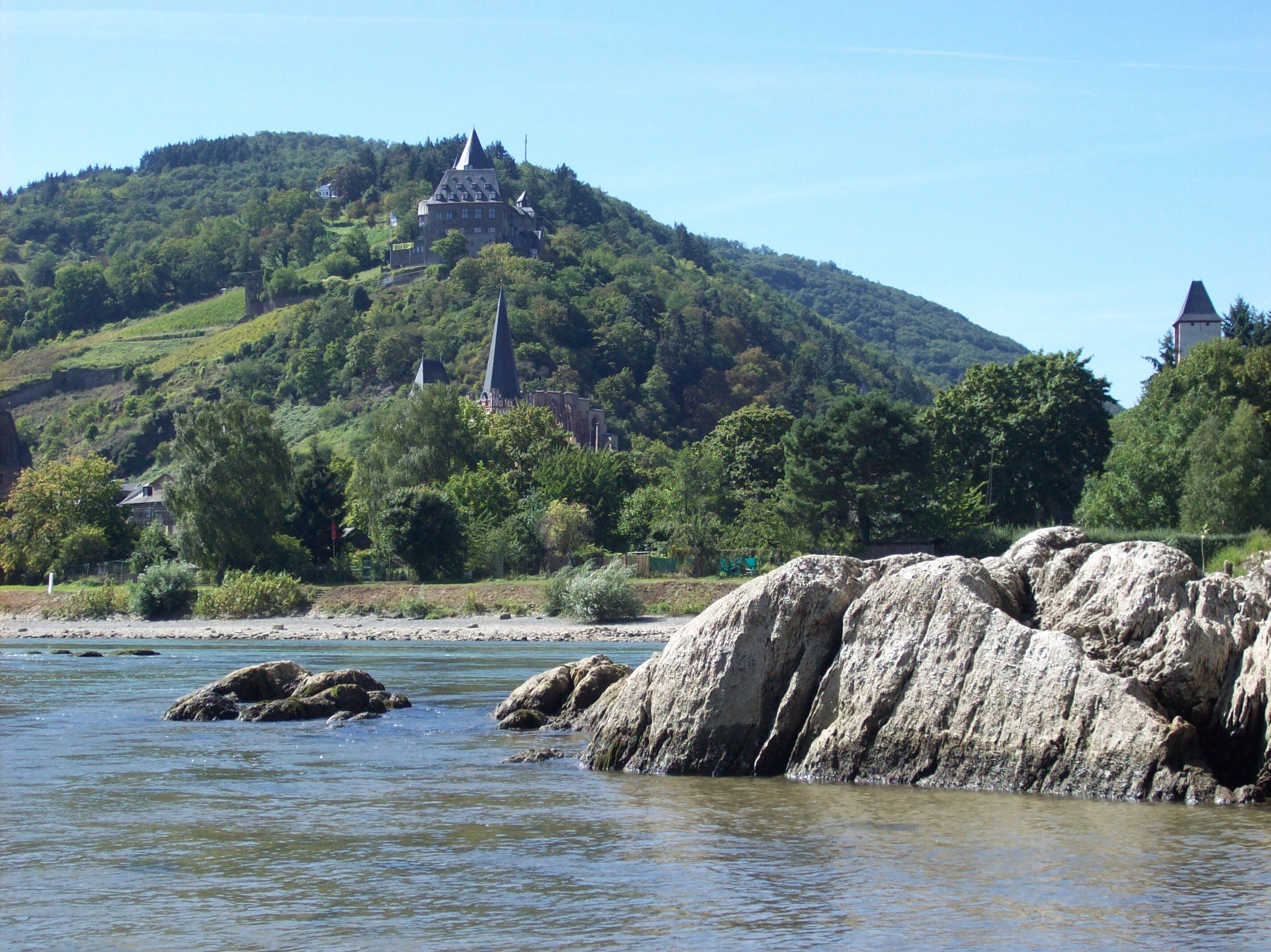 Flossenrisser. Südseite des Bacharacher Werthes. Pegel Kaub: 130 cm